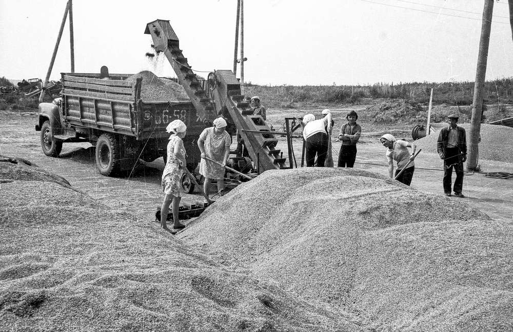 На току в совхозе «Успенская ферма» идёт погрузка зерна на автомашины. Надрывно гудят моторы зернопогрузчиков. Сотни тонн ссыпанного в кучи зерна готовятся к отправке на Берендеевское хлебоприёмное предприятие. Переславский район, село Смоленское. (Переславский музей-заповедник, отдел истории советского общества, конверт 1063. По газетному списку номер 4.)